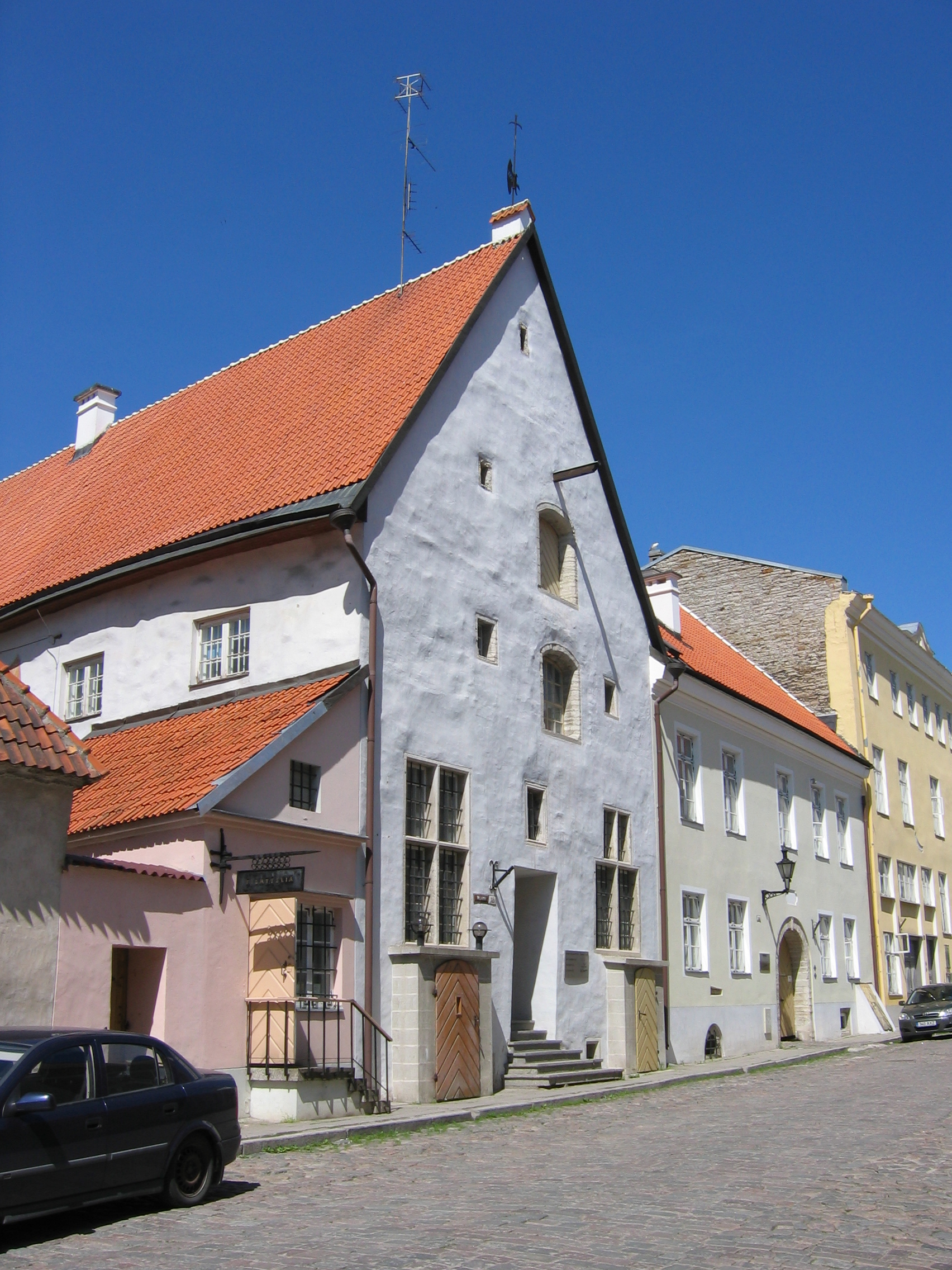 Tallinn, Stadtzentrum